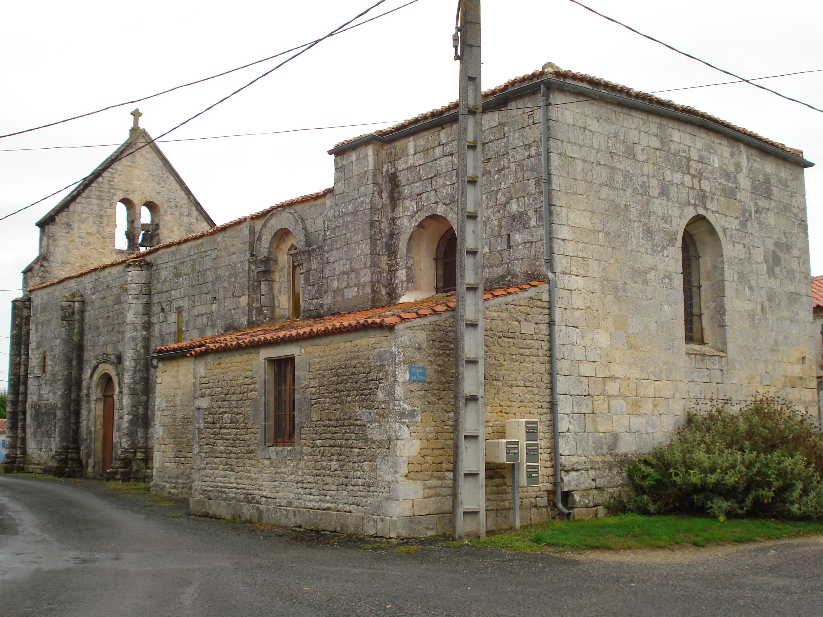 L'église de Paillé (Charente-Maritime)